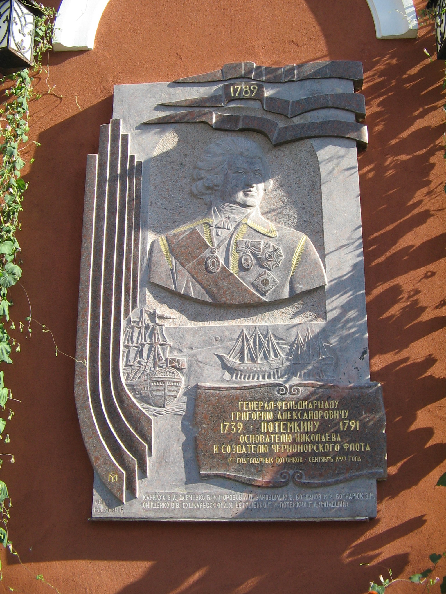 Мемориальная доска Потёмкину в Николаеве